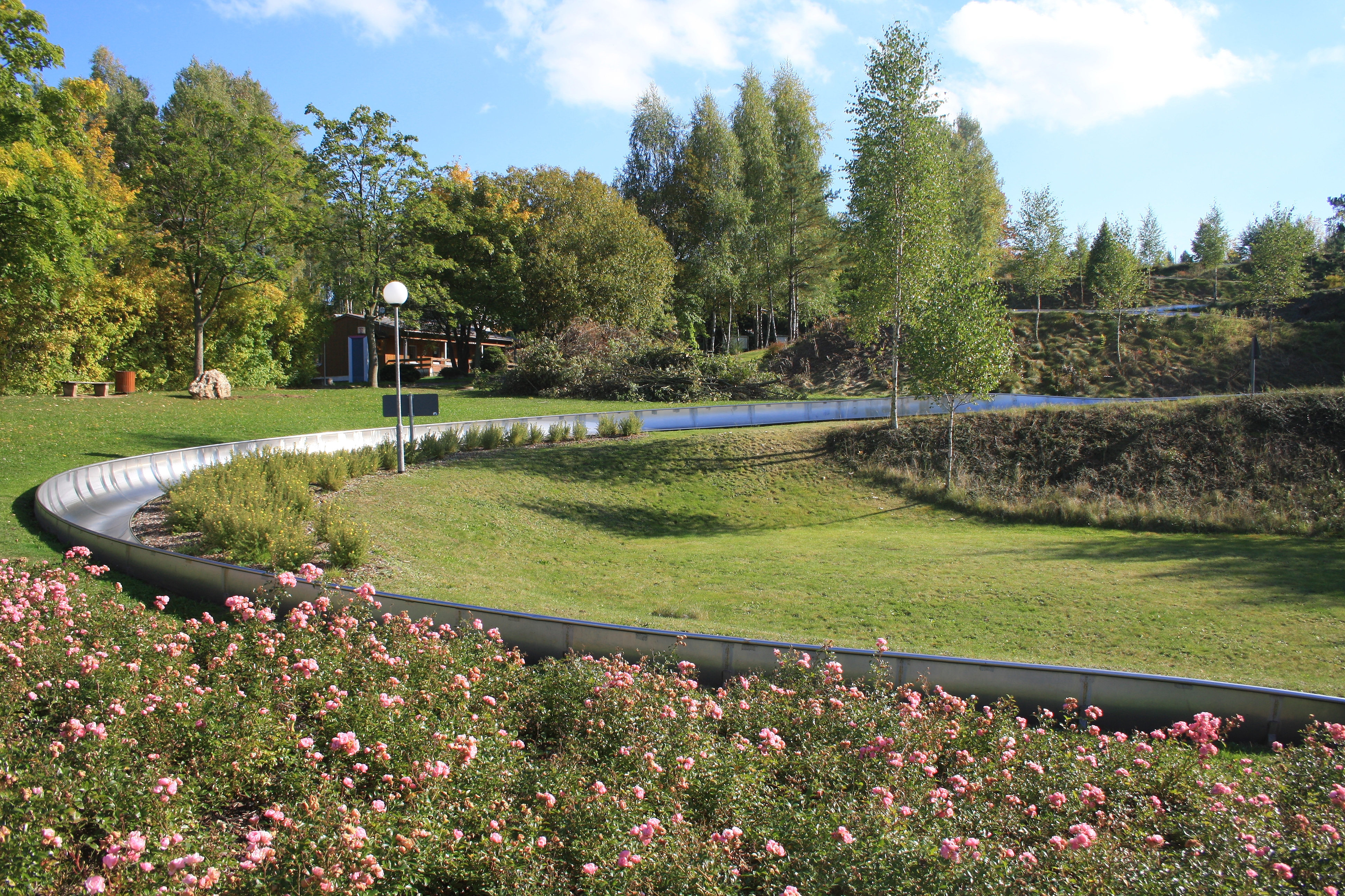 370 m lange Sommerrodelbahn am Stausee Oberwald, Hohenstein-Ernstthal, Sachsen